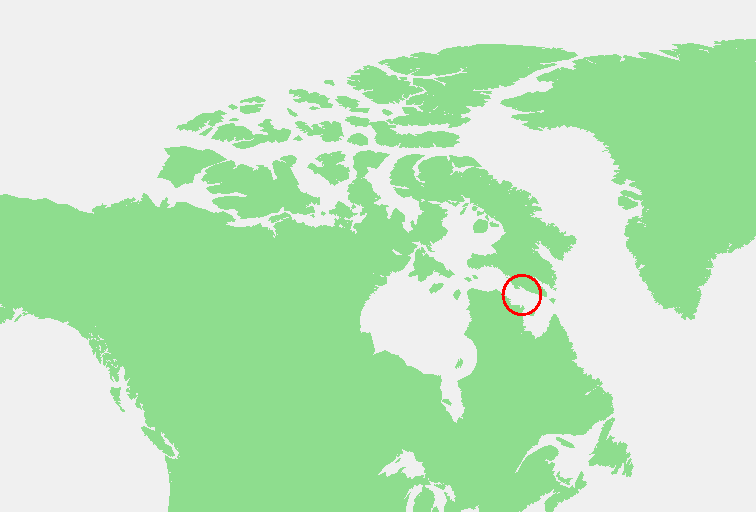 Hudson Straat.PNG